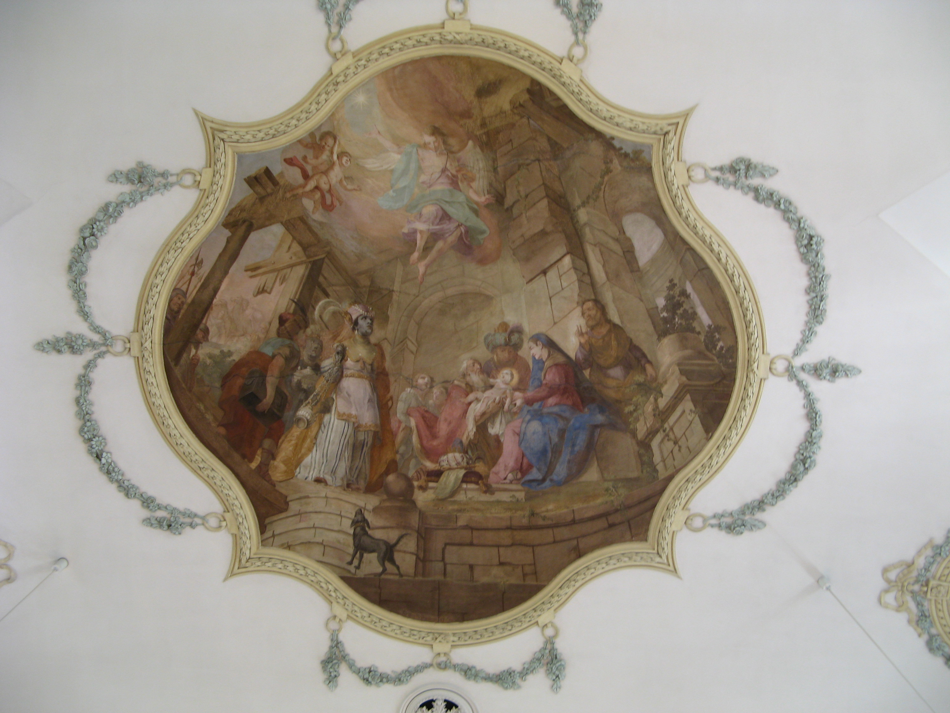 Deckenbild "Anbetung der Könige" in der Pfarrkirche Mariä Geburt in Sins, gemalt von Josef Anton Mesmer